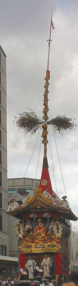 投稿者撮影 2004.07.17